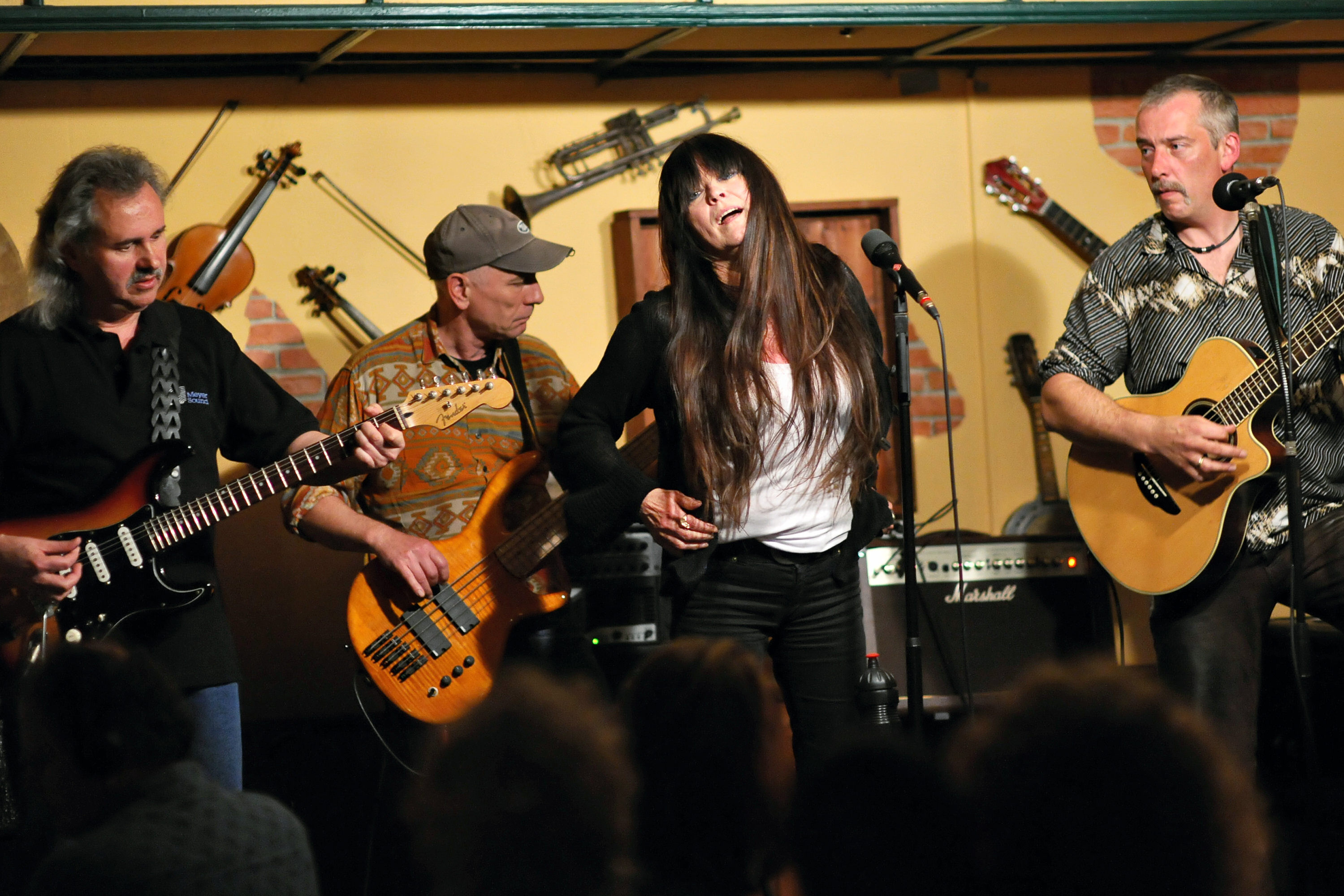 Auftritt der Band "Jutta Weinhold's Akustik Randale" im irish Pub "The Old Dubliner" Hamburg, 13. Juni 2009